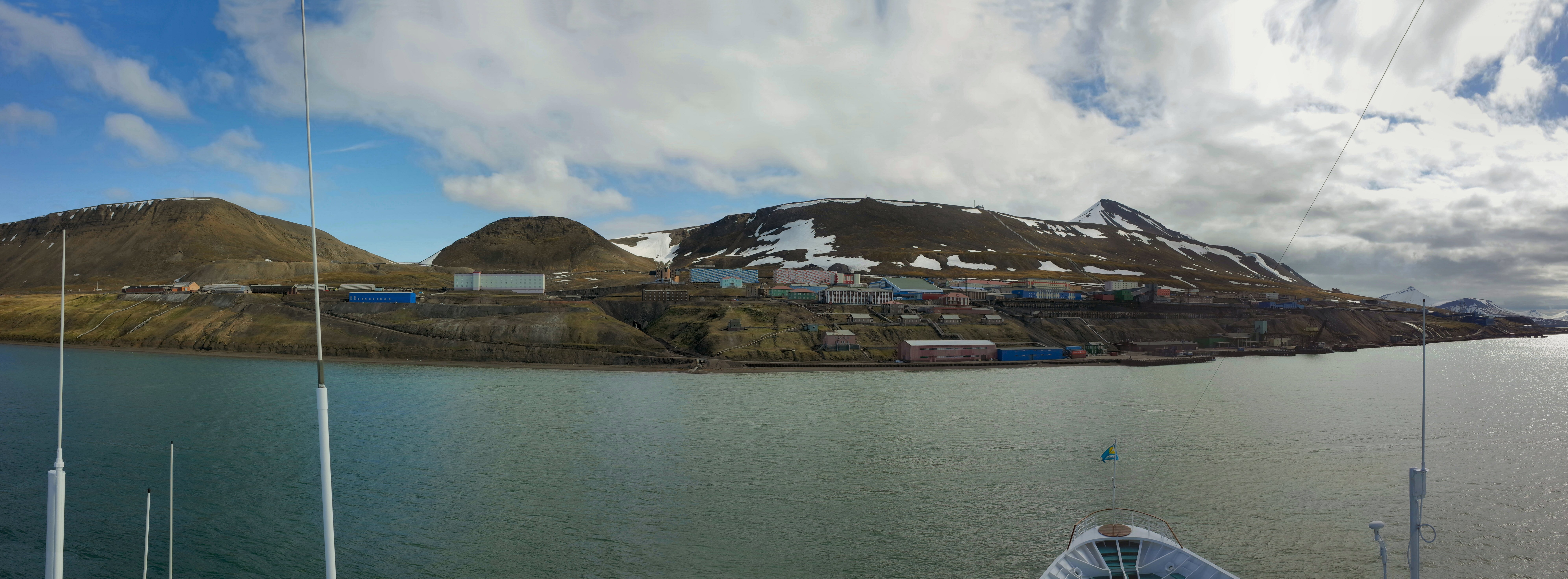 Barentsburg, Panorama. Links die Ställe, mitte die Stadt, rechts Kohledeponie und Kraftwerk